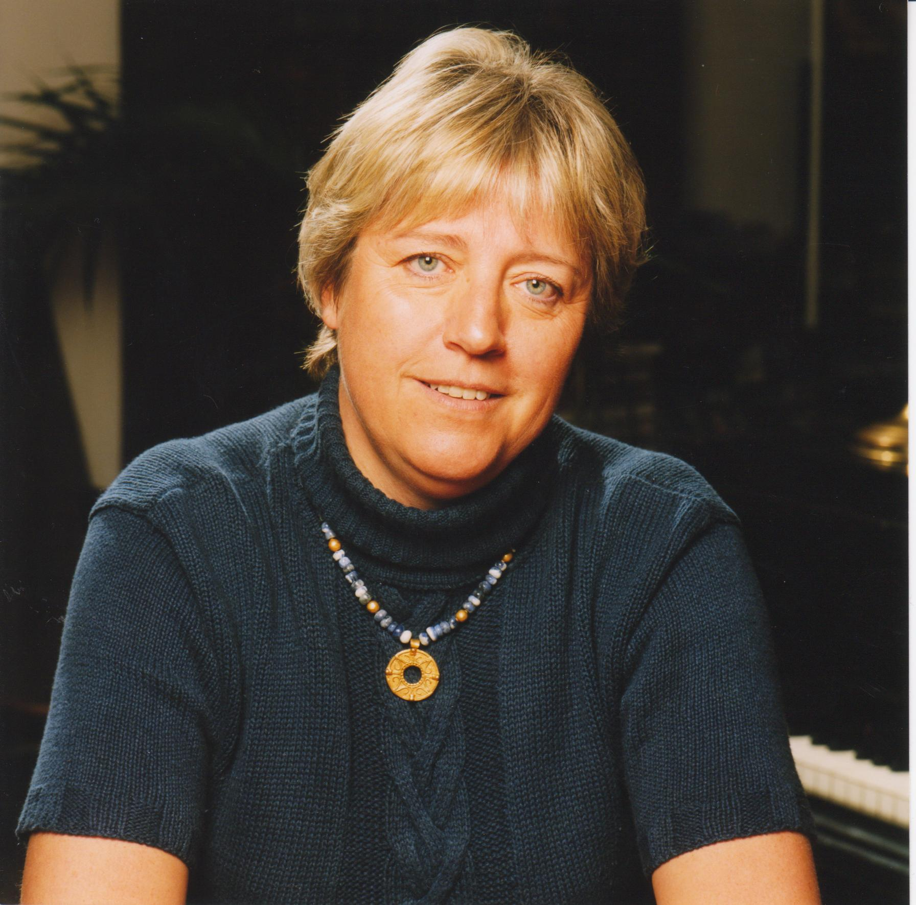 Isabelle Rigaux, compositeur et chanteuse